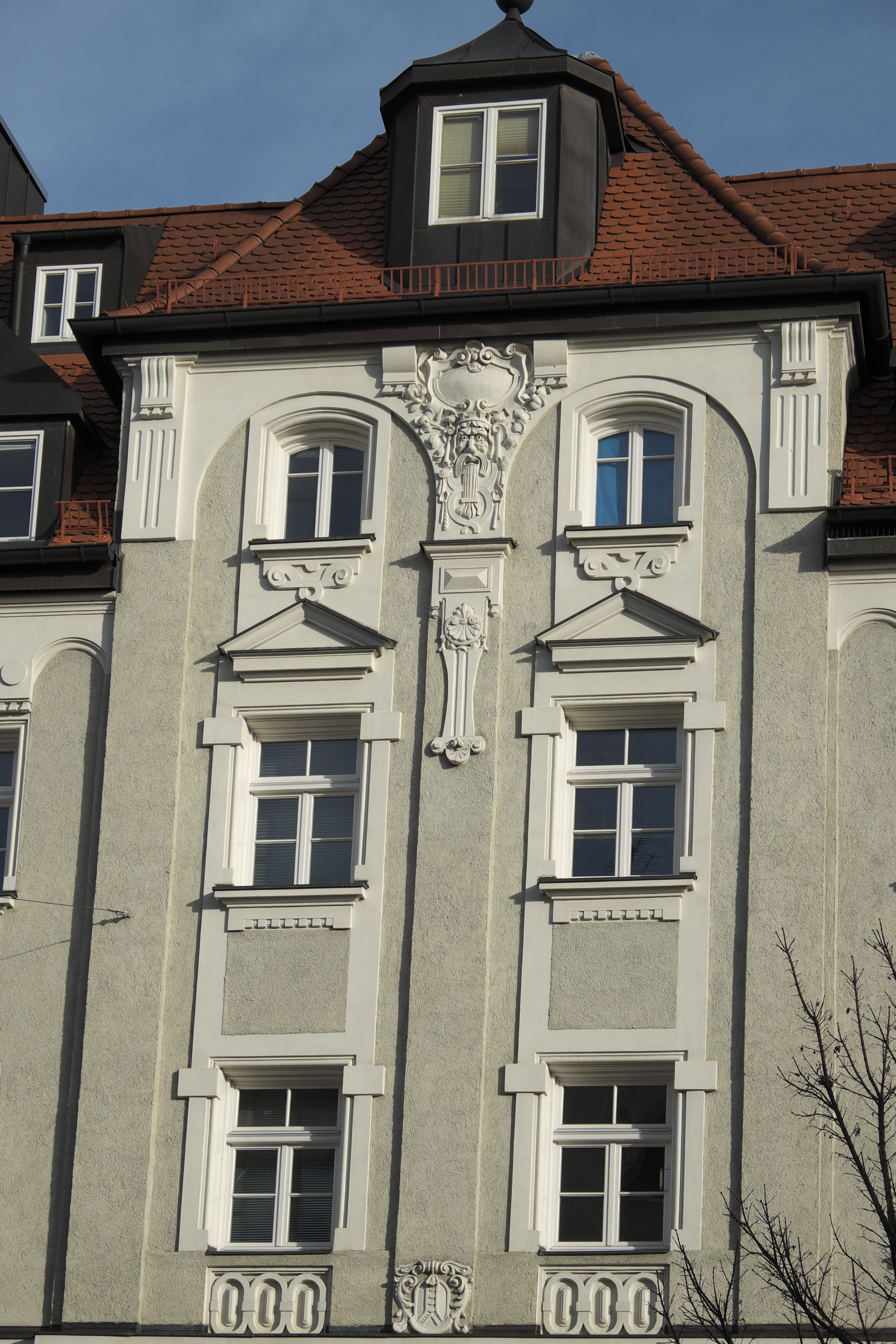 Mietshaus in der Donnersbergerstraße 50 in Neuhausen im Stadtbezirk Neuhausen-Nymphenburg in München (Bayern/Deutschland), um 1900